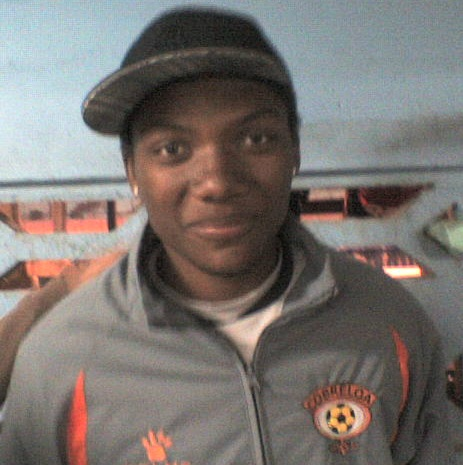 Junior Fernandes en Cobreloa en el año 2008